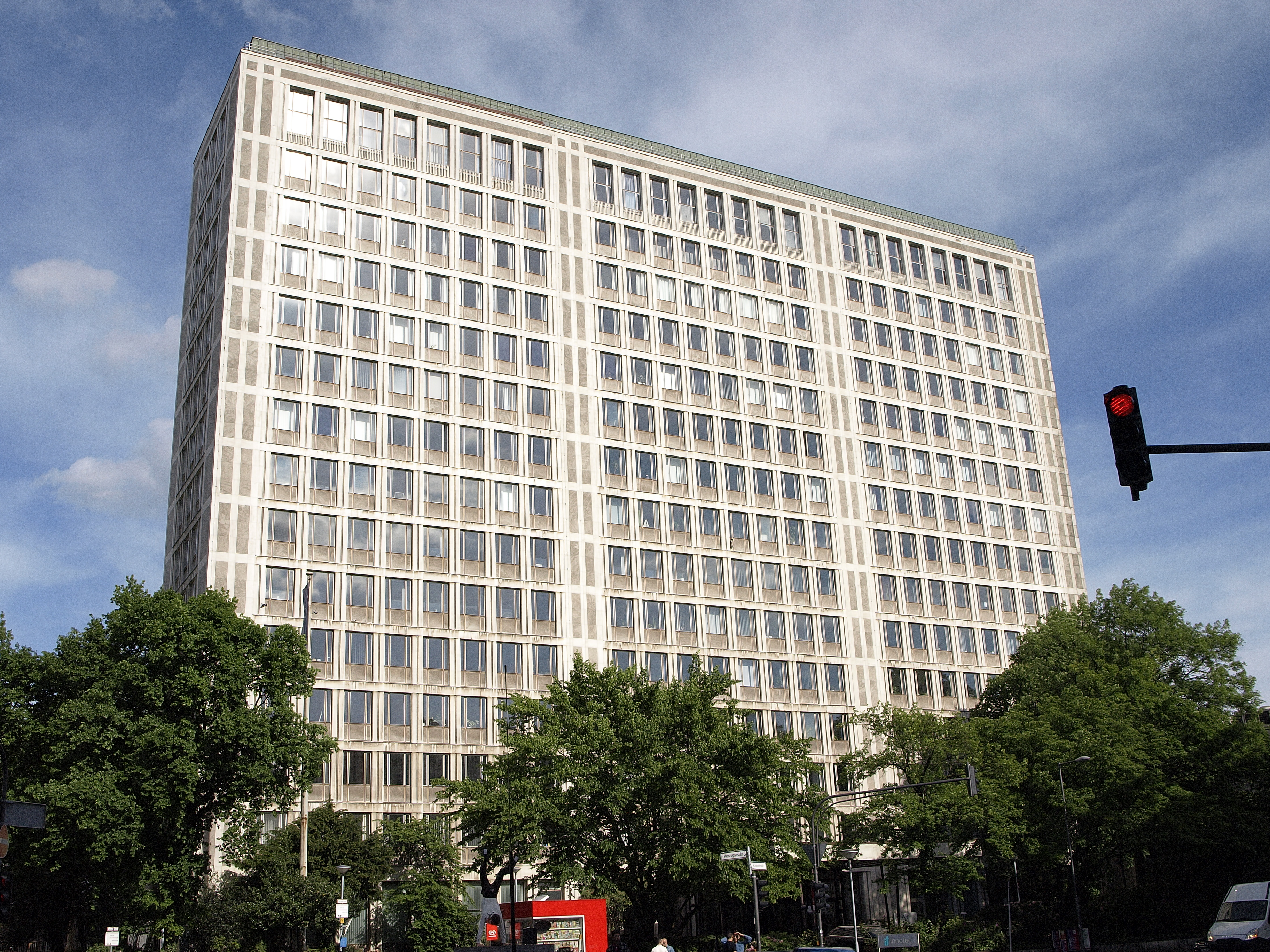 Das ehemalige Verwaltungshochaus der Vereinigten Glanzstoff-Fabriken in Wuppertal-Elberfeld, Kasinostraße